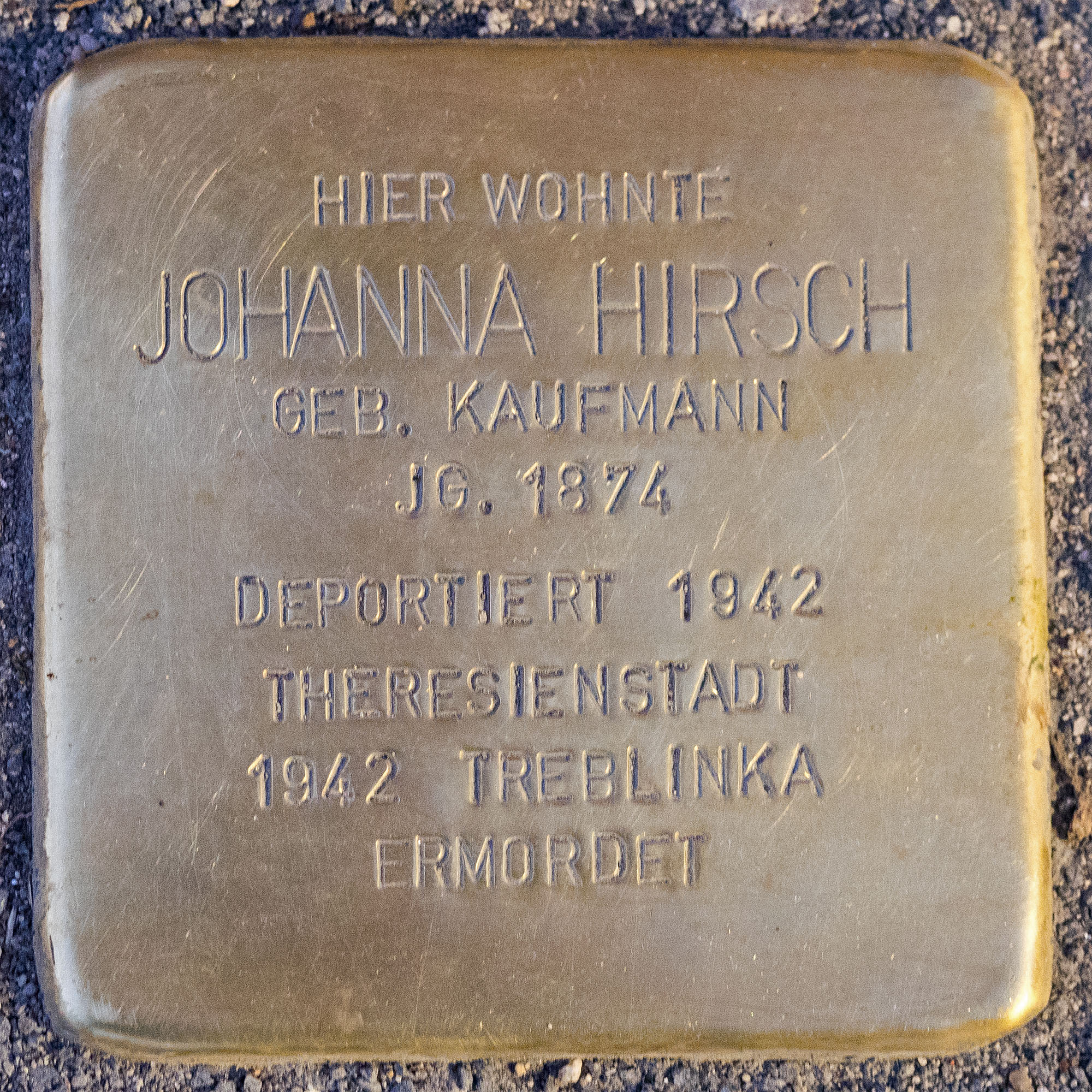 2016 11 25 Stolpersteine Kempen Hirsch Johanna (geb. Kaufmann)